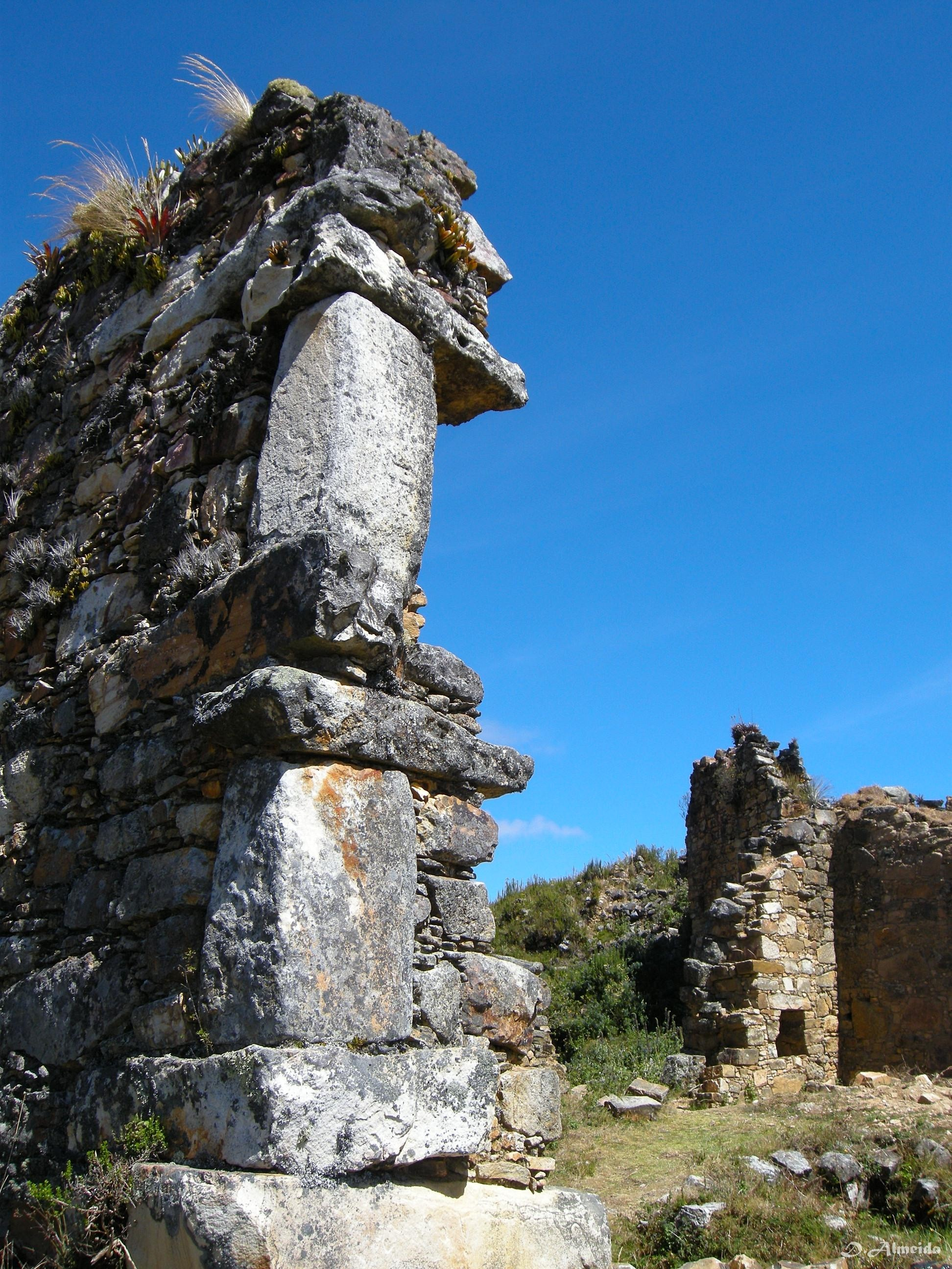 Marcahuamachuco: Detalles de muros del Castillo